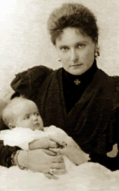 ロシア皇帝ニコライ2世3女マリアを抱くアレクサンドラ皇后